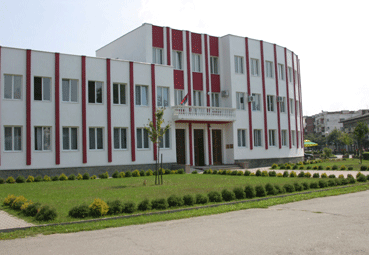 Budova sídla opštiny Srbac